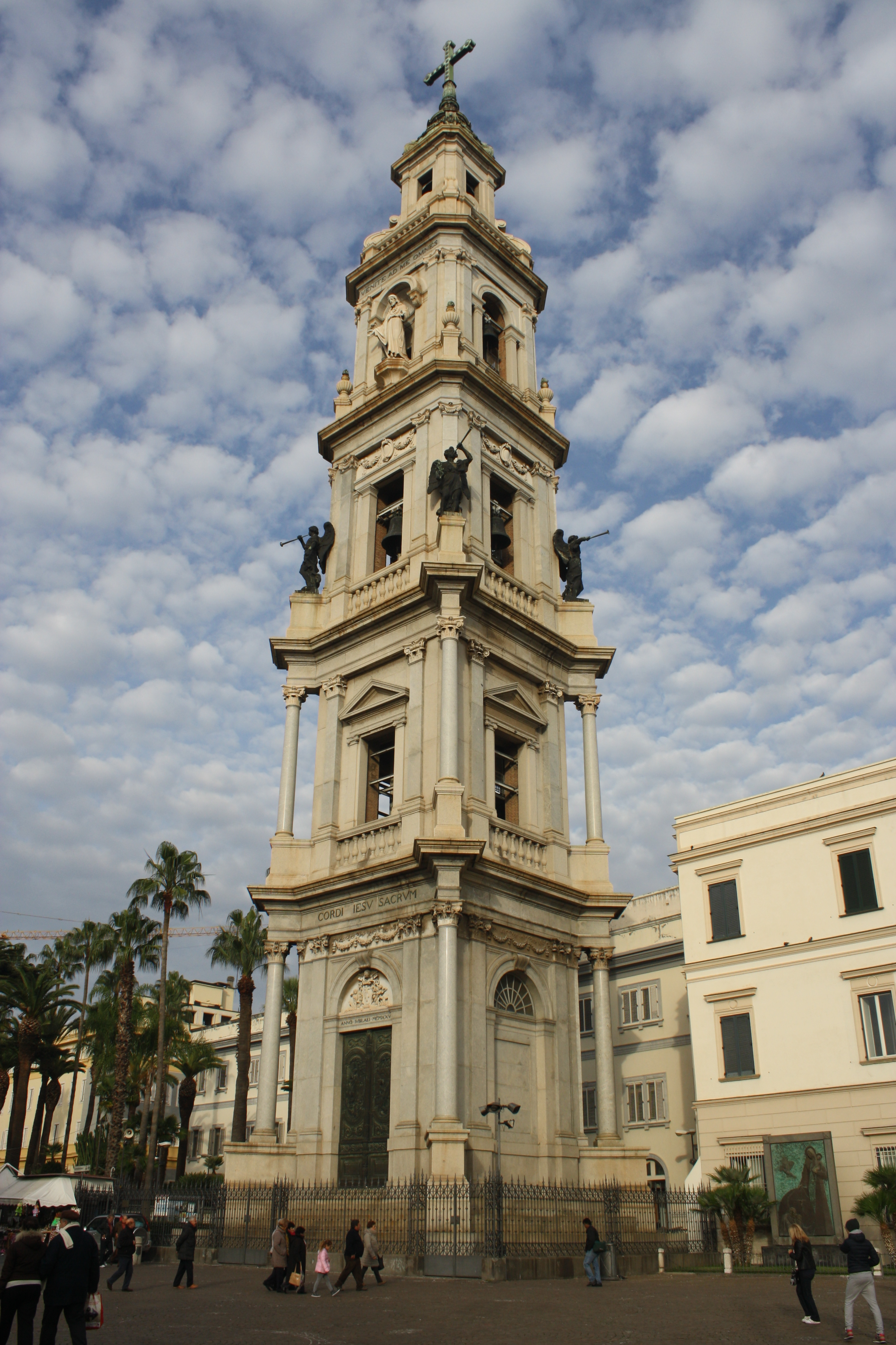 Campanile del santuario della Beata Vergine del Rosario di Pompei.